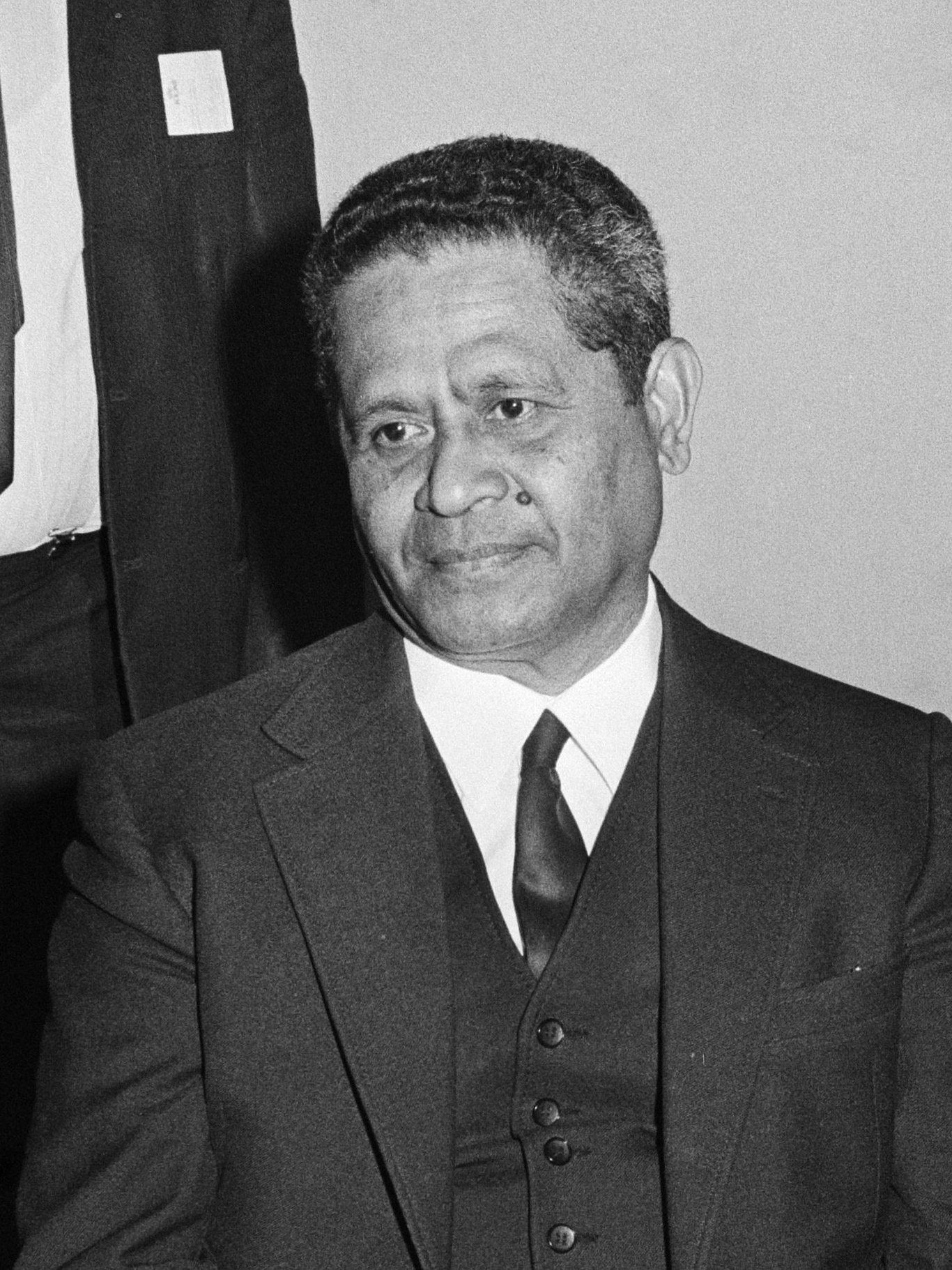 Zuid-Molukkers herdenken in Den Haag hun onafhankelijkheidsproclamatie van 25 april 1950; Ds Samuël Metiarij, voorman van de Badan Persatuan 25 april 1977